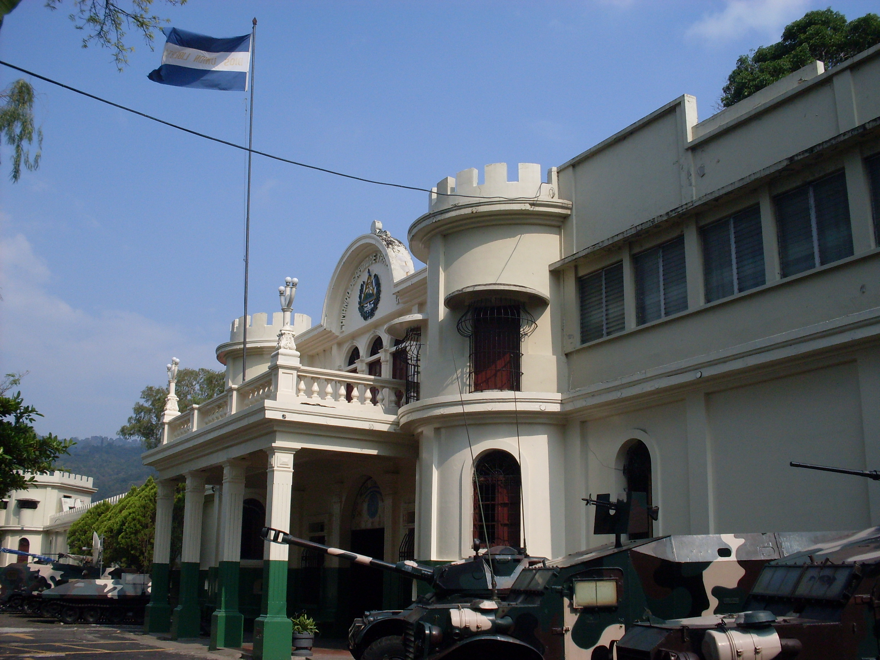 Cuartel El Zapote en San Salvador, sede del Museo Militar de la Fuerza Armada de El Salvador.